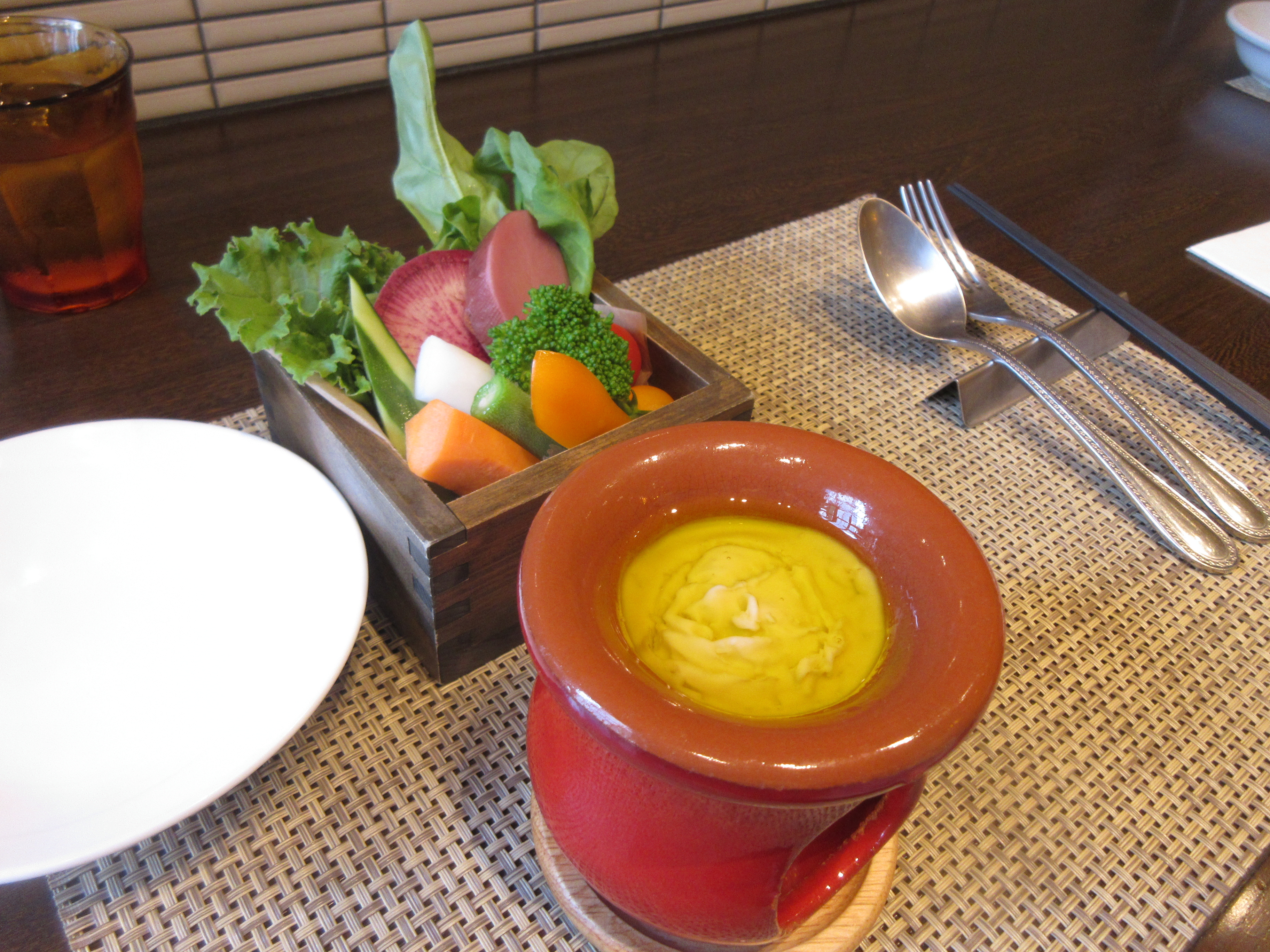 バーニャ・カウダ。愛知県のイタリアン・レストランにて撮影。